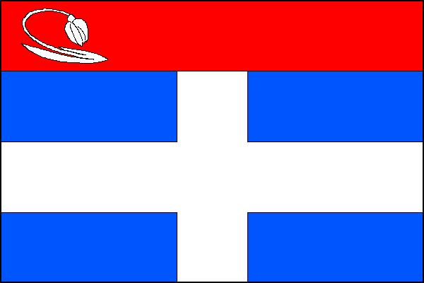 Vlajka obce Zahrádky (okres Česká Lípa)